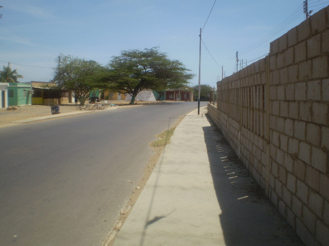 calles de nuevo pueblo 2